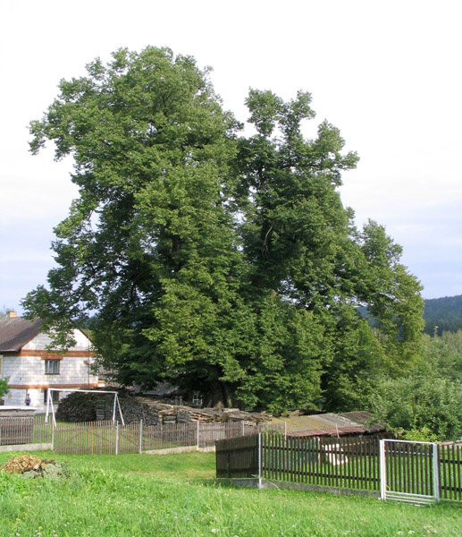 Dobřív, okres Rokycany, Laiblova lípa rostoucí v zahradě u čp. 36.